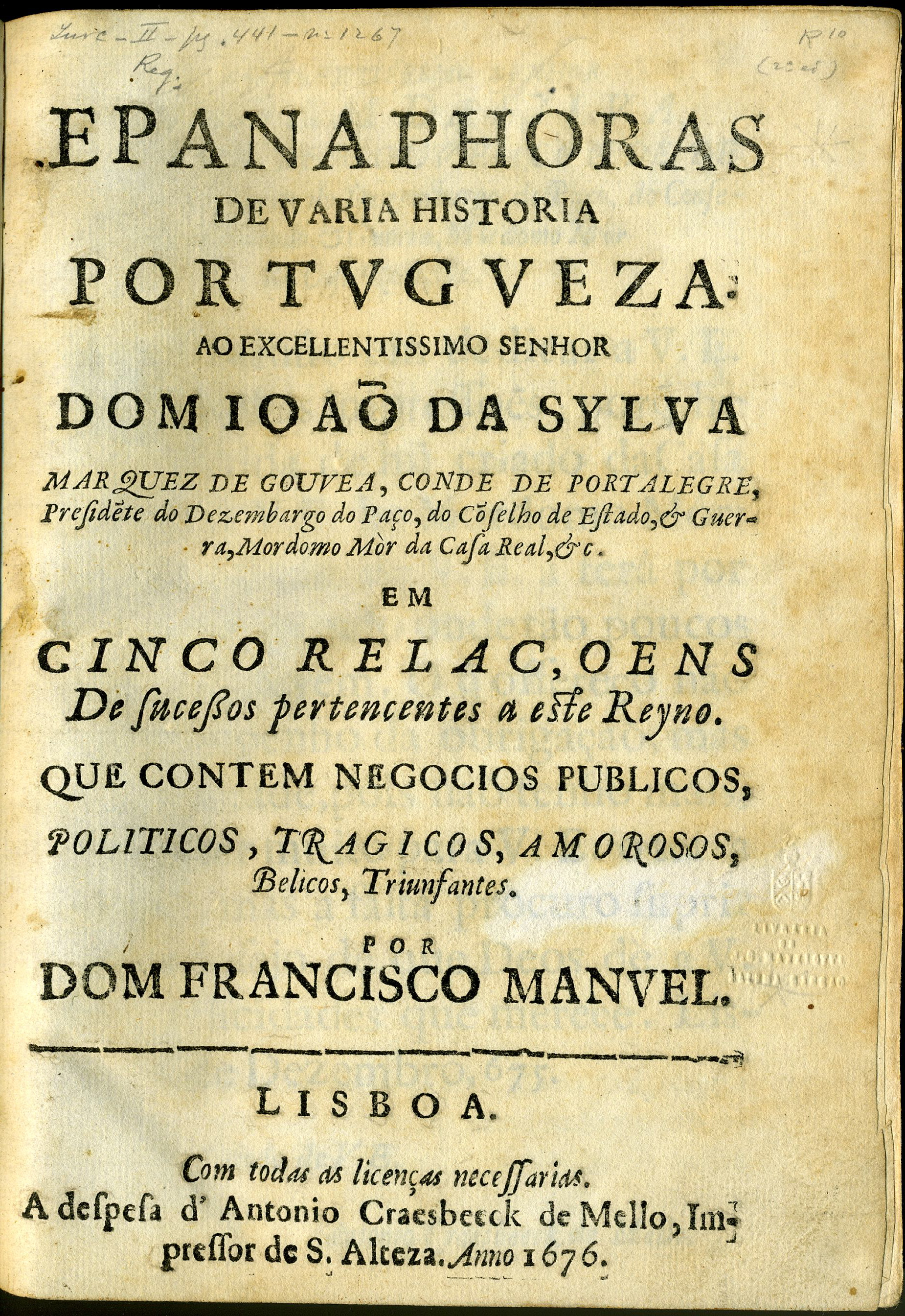 frontispice de "Epanaphoras de varia historia portugueza". Lisboa. 1676